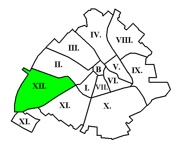 Kecskemét XII. kerületének elhelyezkedése